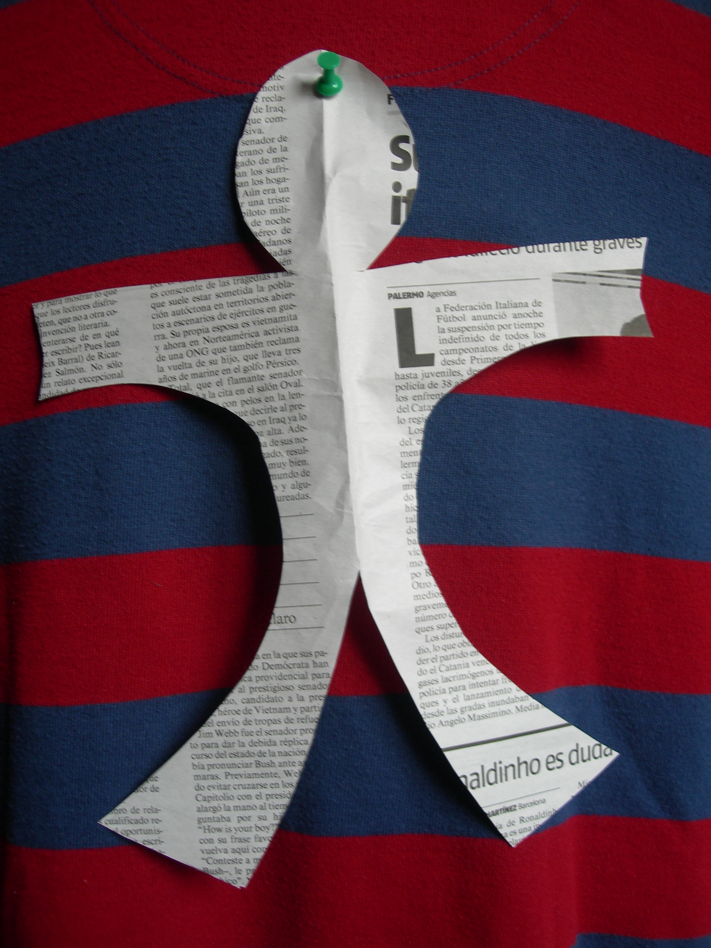 Fotografia d'una llufa de paper de diari.